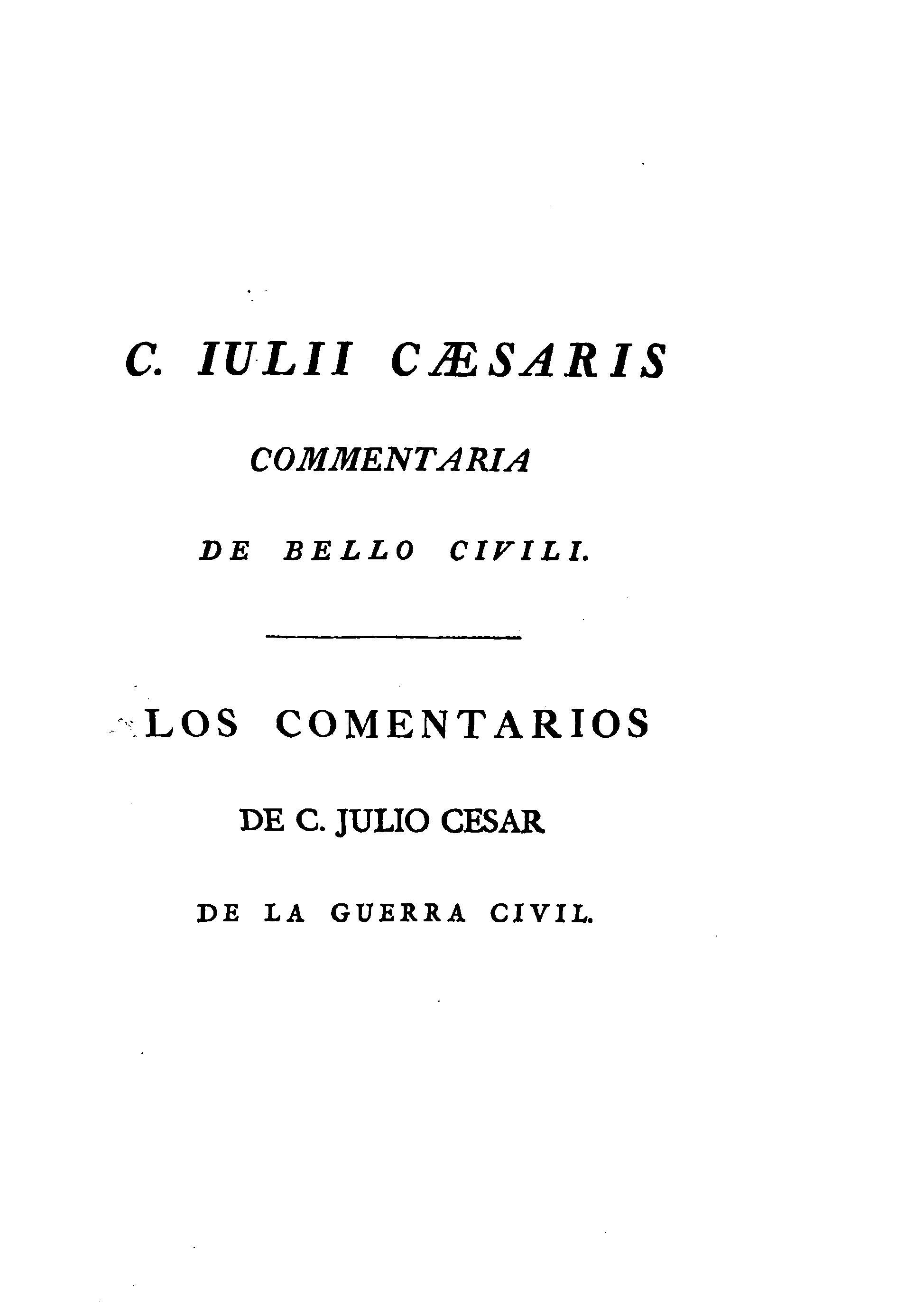 Los Comentarios de Cayo Julio César - Tomo II (traducción de Goya y Muniain)